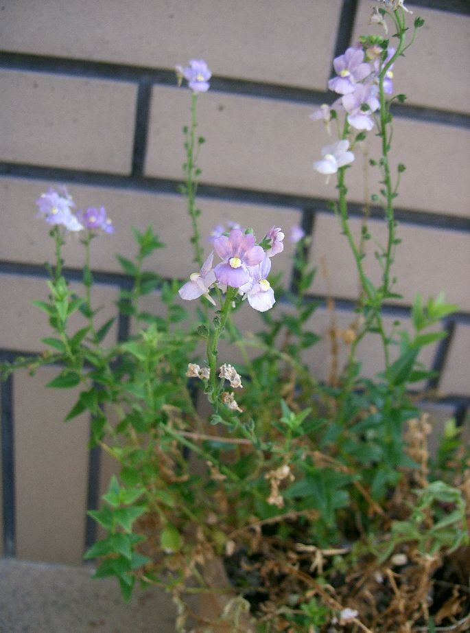 Nemesia sp.